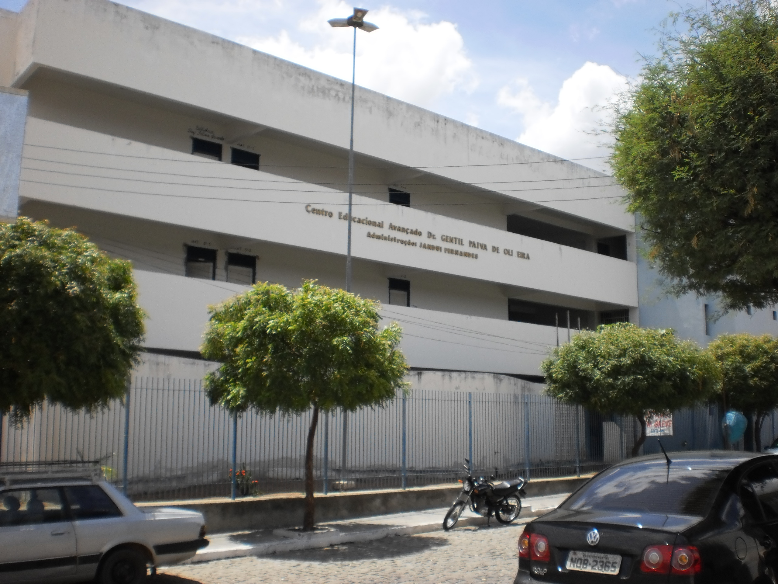 Centro Educacional Avançado Dr. Gentil Paiva de Oliveira - Alexandria, Rio Grande do Norte.